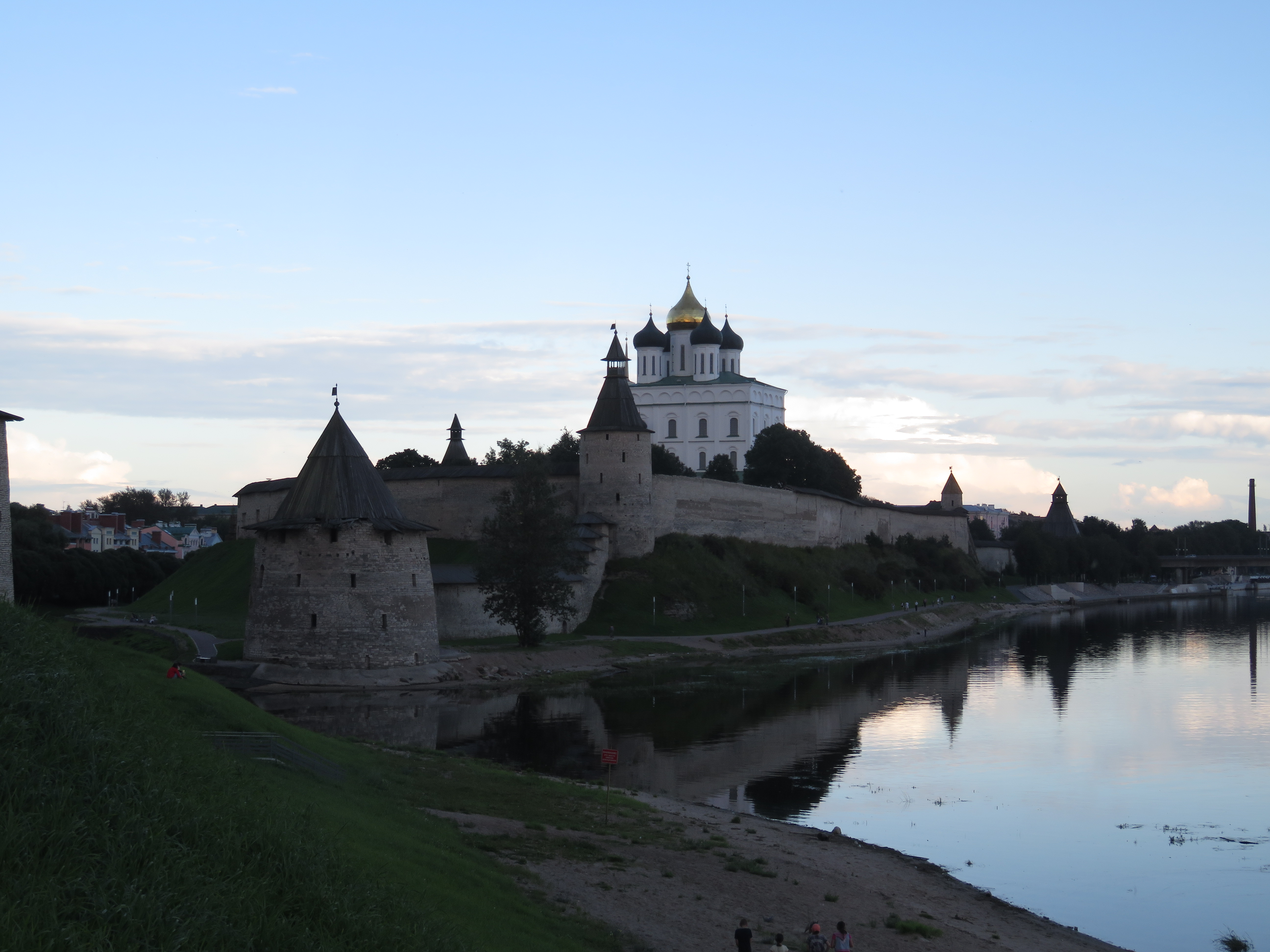 Великая в Пскове